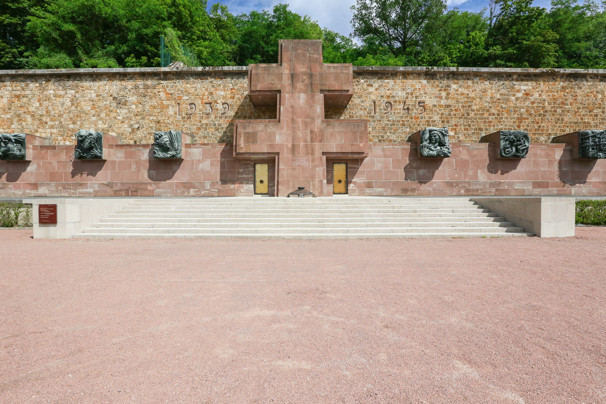 Mont Valérien .